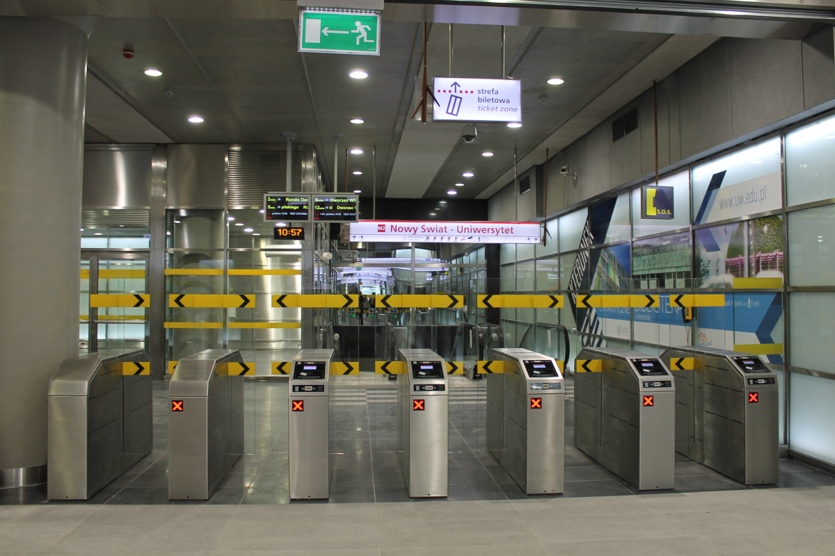 Wschodnia hala odpraw stacji C12 Nowy Świat-Uniwersytet.